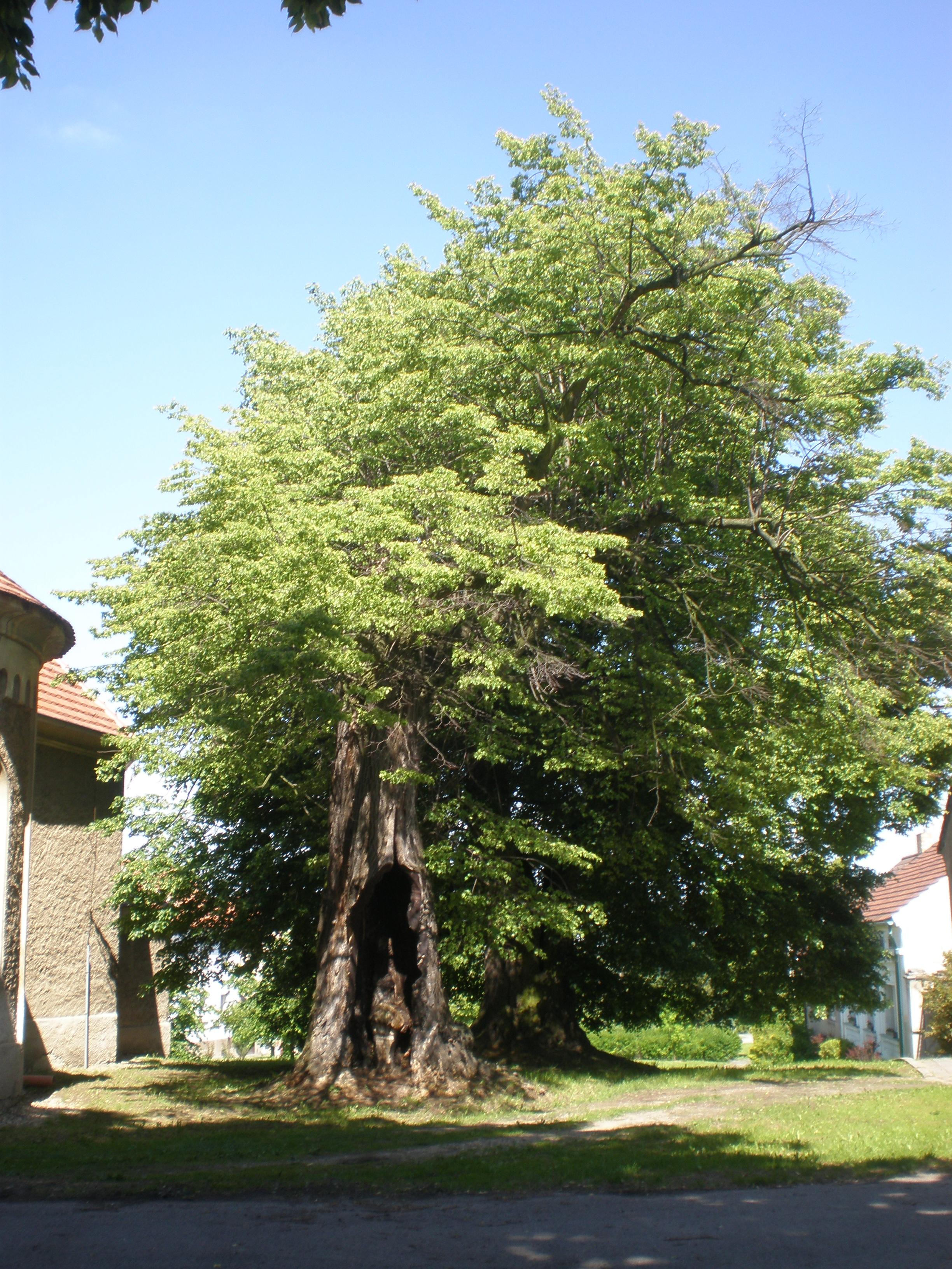 Lípa malolistá v Ledcích na Kladensku (PS Lípy v Ledcích č. 104128)